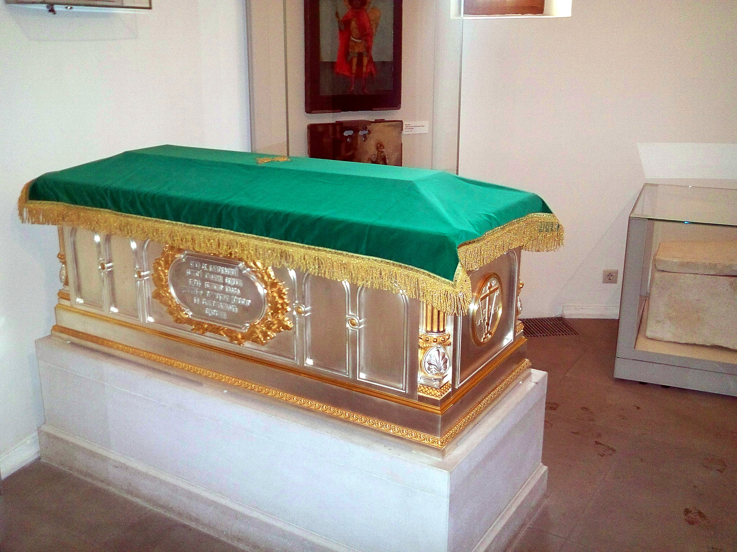 В этой раке, расположенной в часовне мч. Уара у алтарной стены Архангельского собора московского Кремля находятся честные мощи Св. Евфросинии Московской